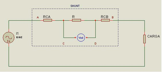 Ejemplo de conexión de un Shunt